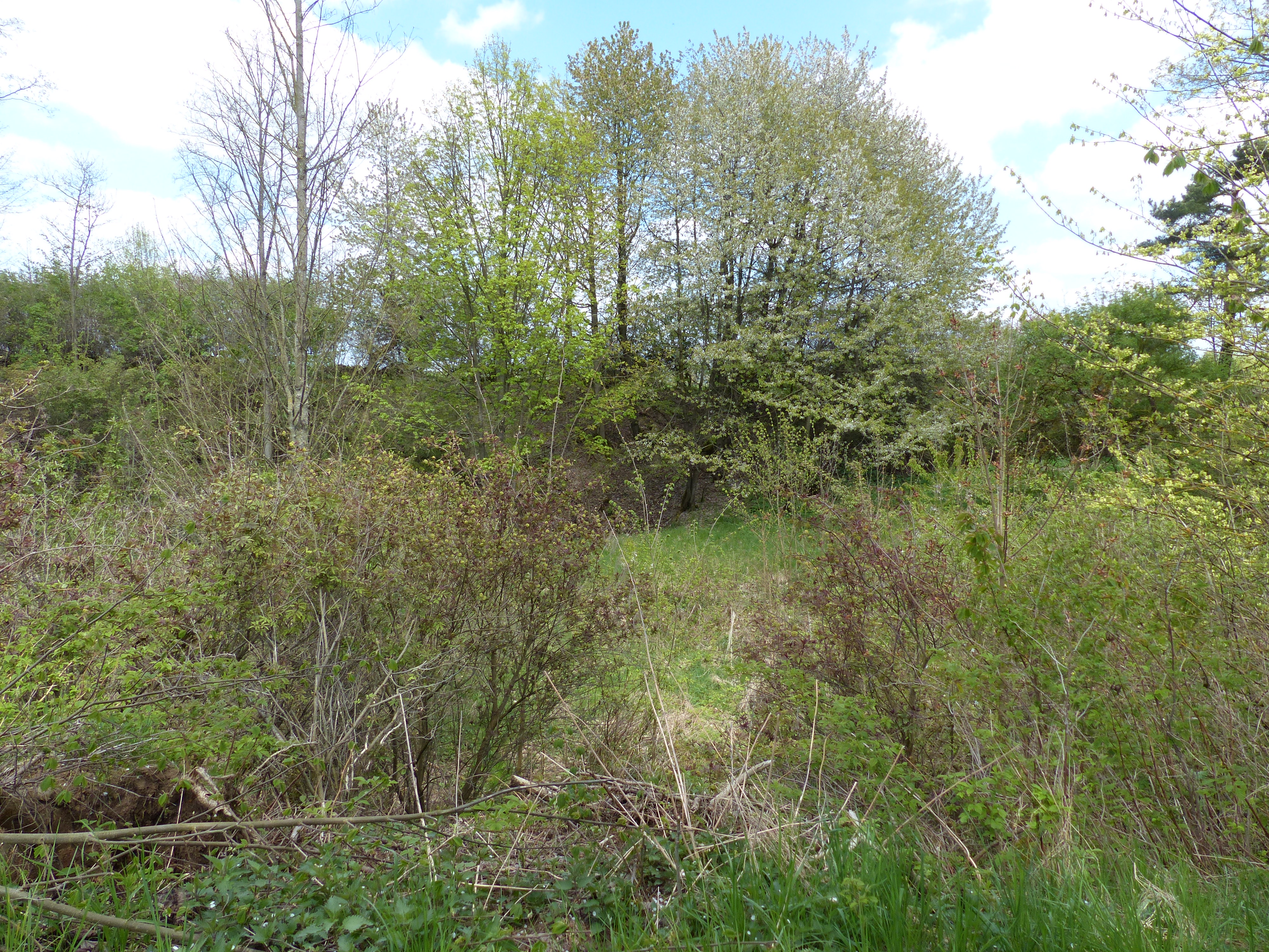 Geotop 475A023, ehemaliger Steinbruch bei Osseck am Wald